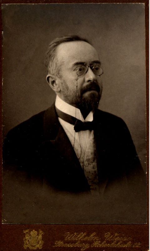 Porträt-Aufnahme von Professor Dr. Albert Thumb